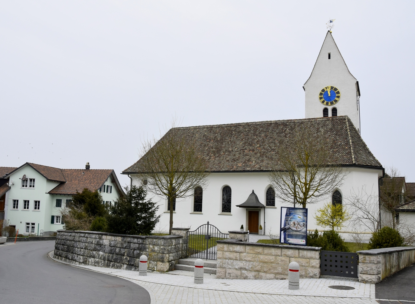 Reformierte Kirche, ID 18200642